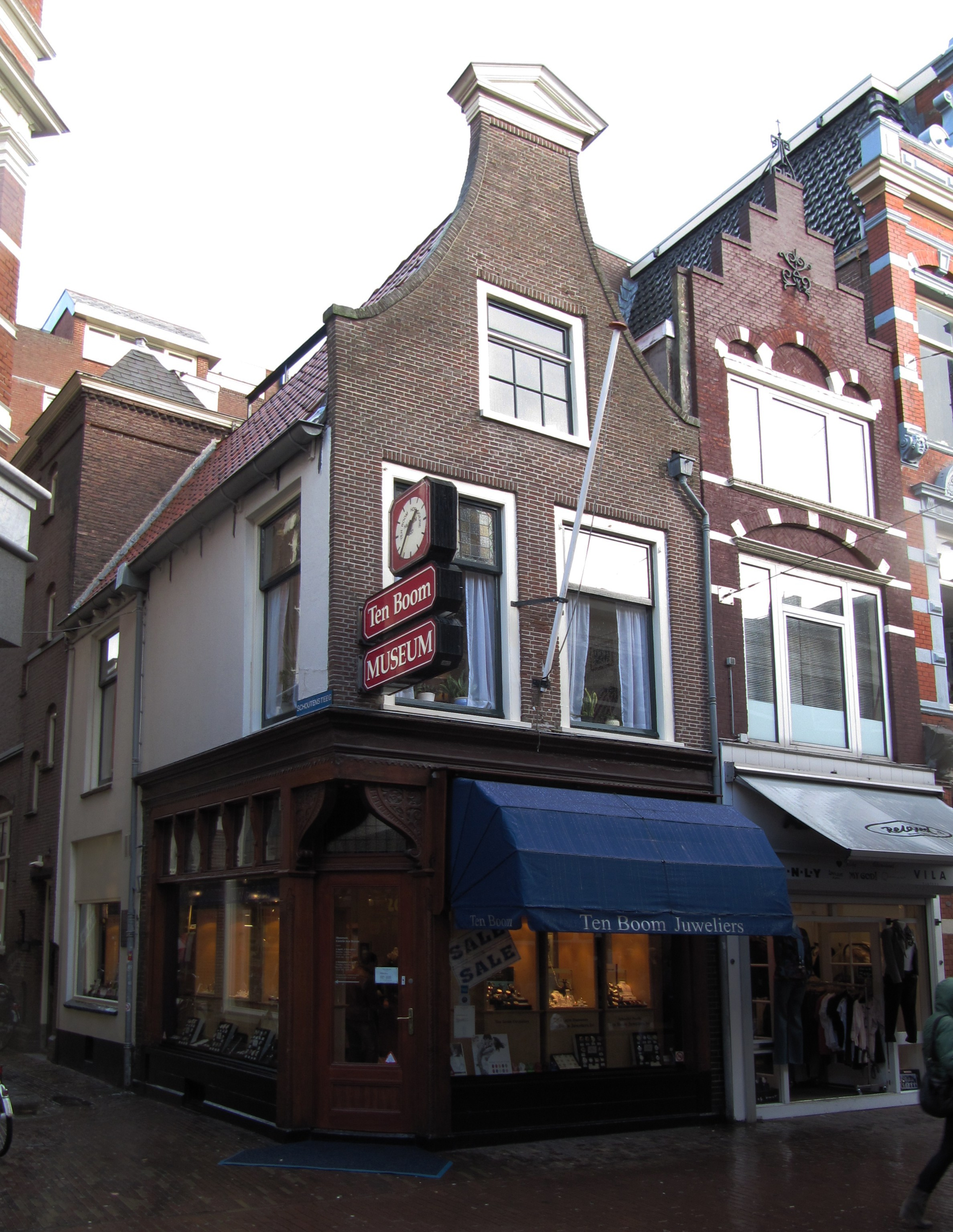 RM18966 Haarlem - Barteljorisstraat 19.jpg